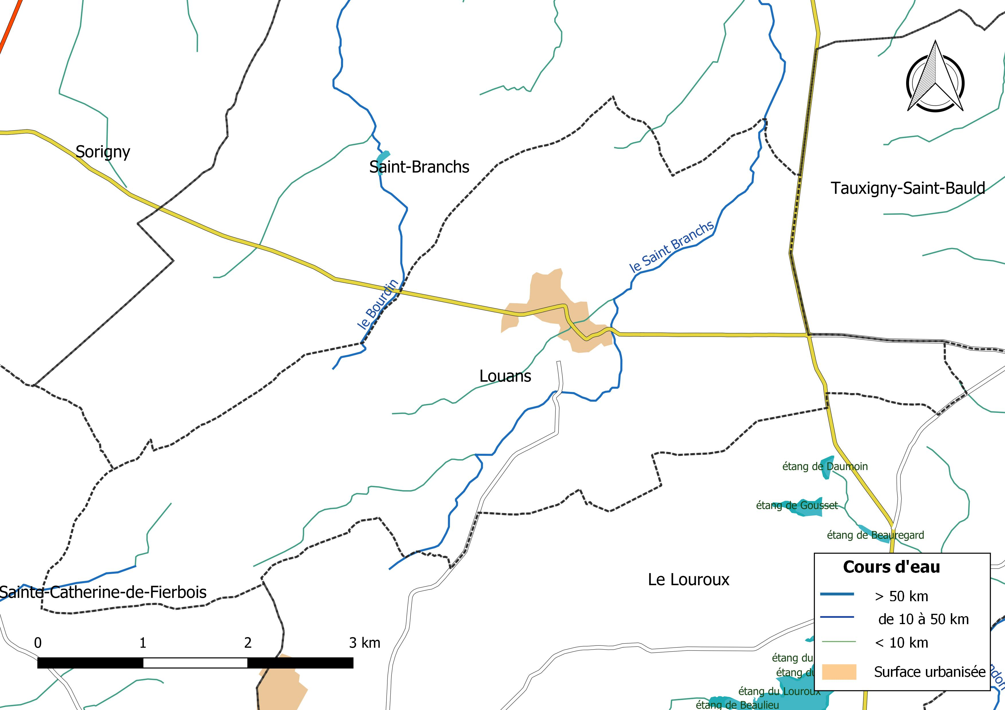 Carte du réseau hydrographique de la commune de Louans (France).